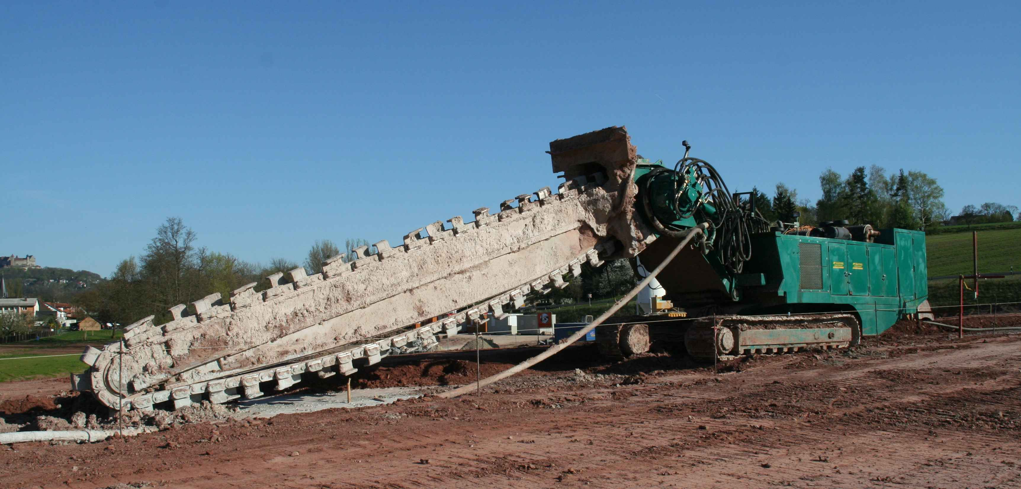 Bodenfräse Bodenfräse zur Herstellung einer Dichtwand, Baustelle Goldbergsee, Coburg